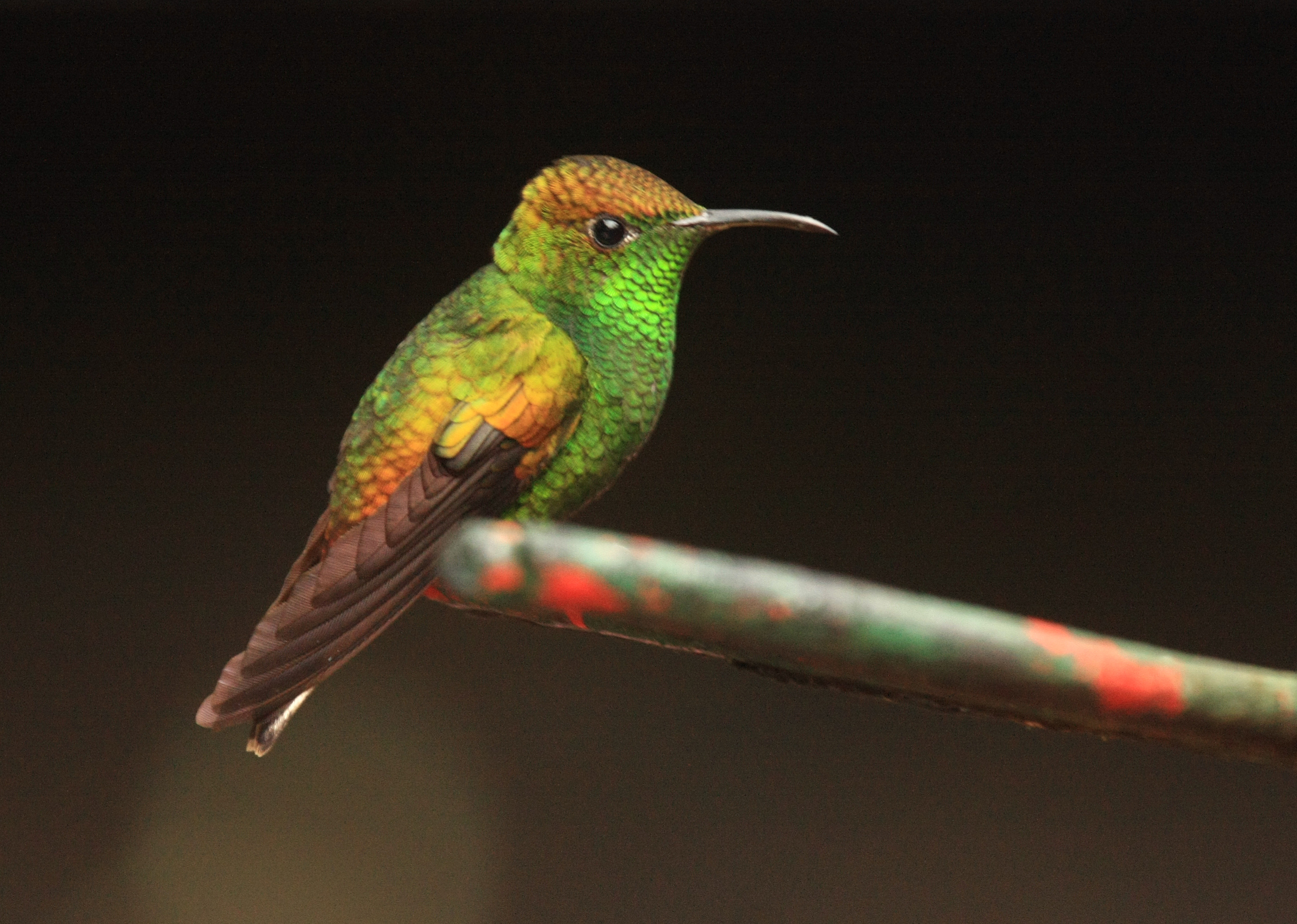 Male Elvira cupreiceps in Costa Rica.